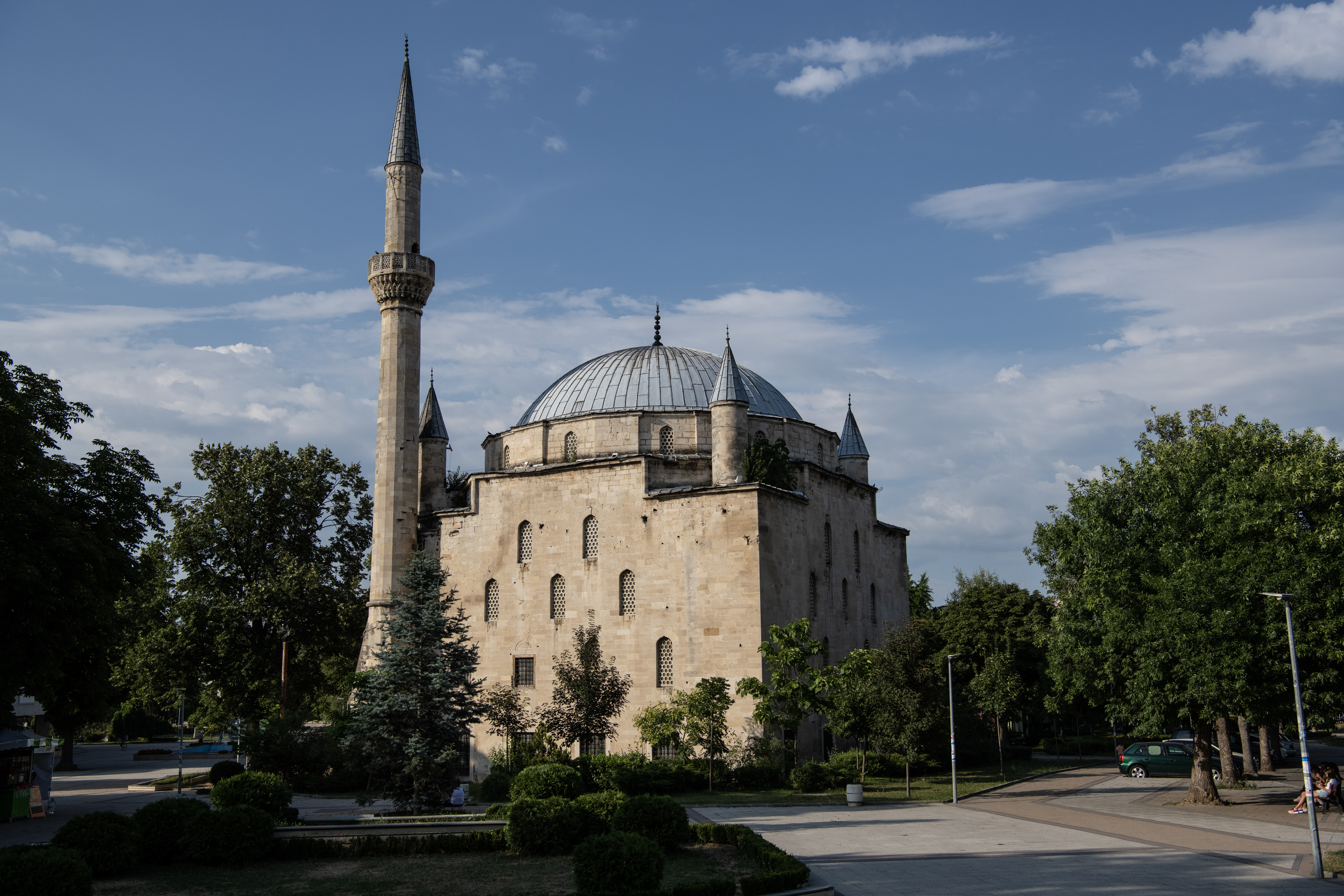 Снимката документира джамията "Ибрахим Паша" в град Разград.